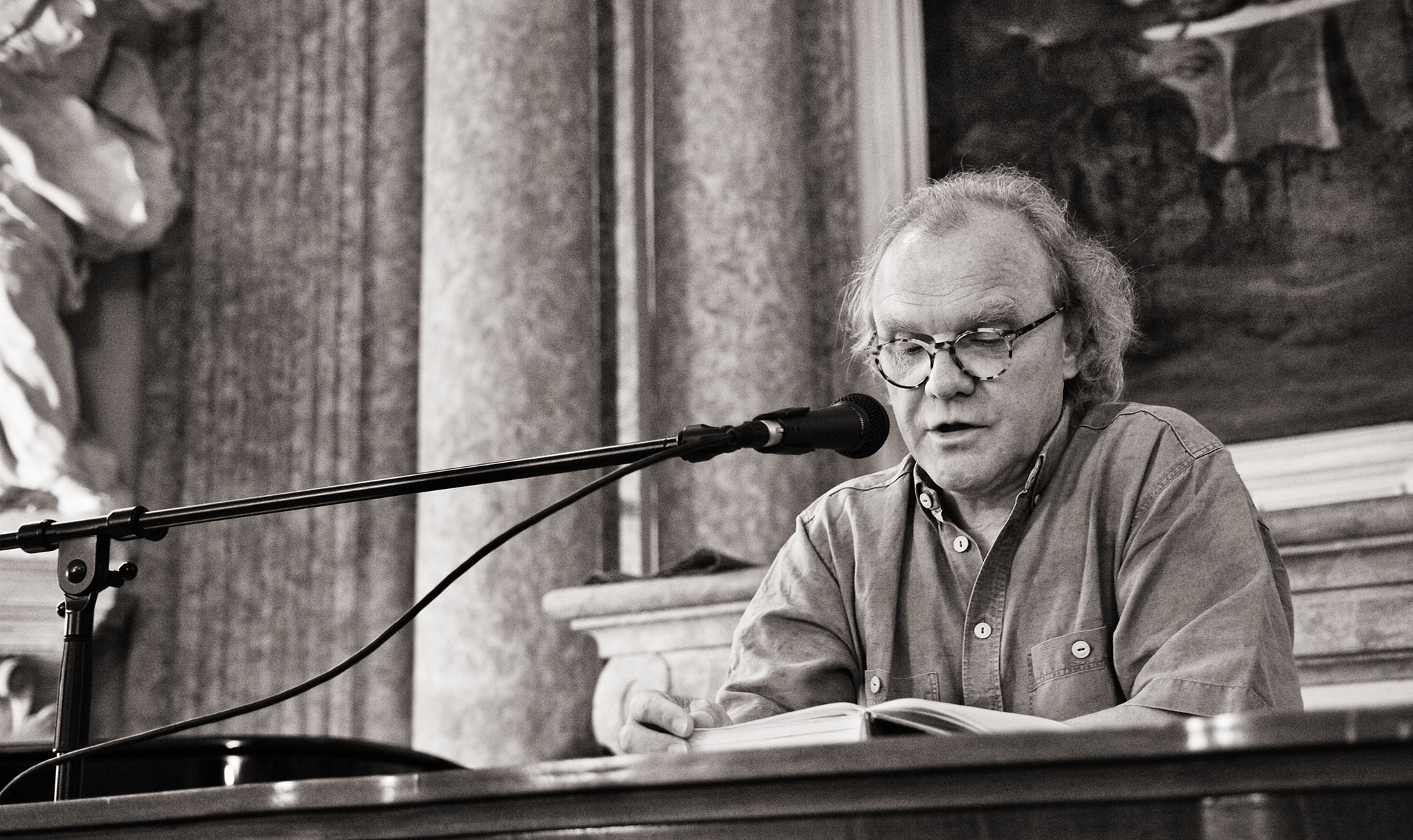 Michael Köhlmeier in Olmütz